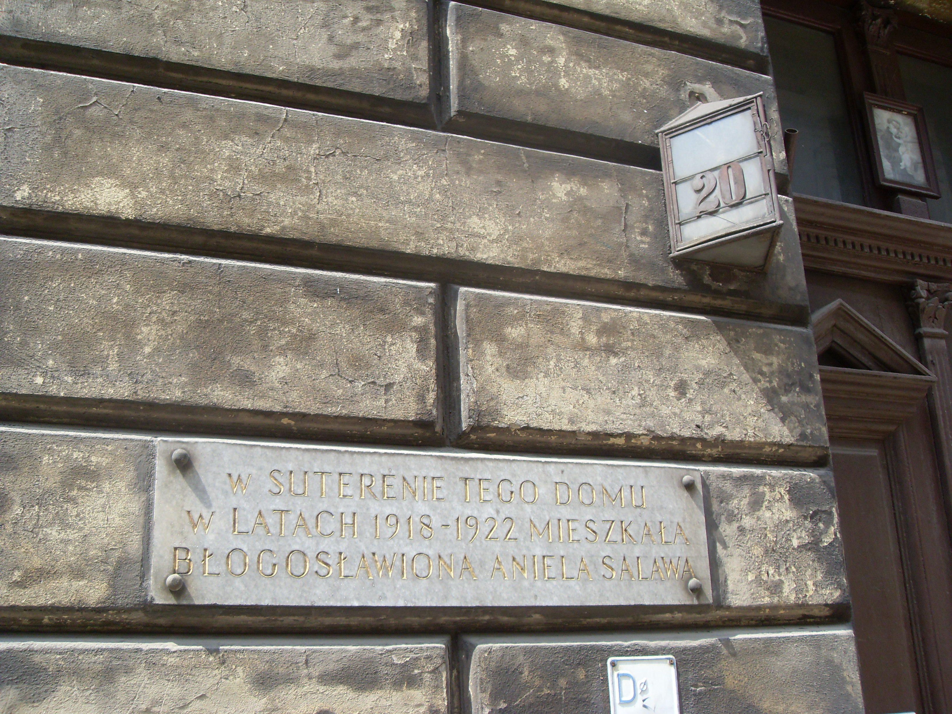 Tablica na budynku przy ul. Radziwiłłowskiej 20 w Krakowie, w którym w latach 1918 - 1922 mieszkała bł. Aniela Salawa.